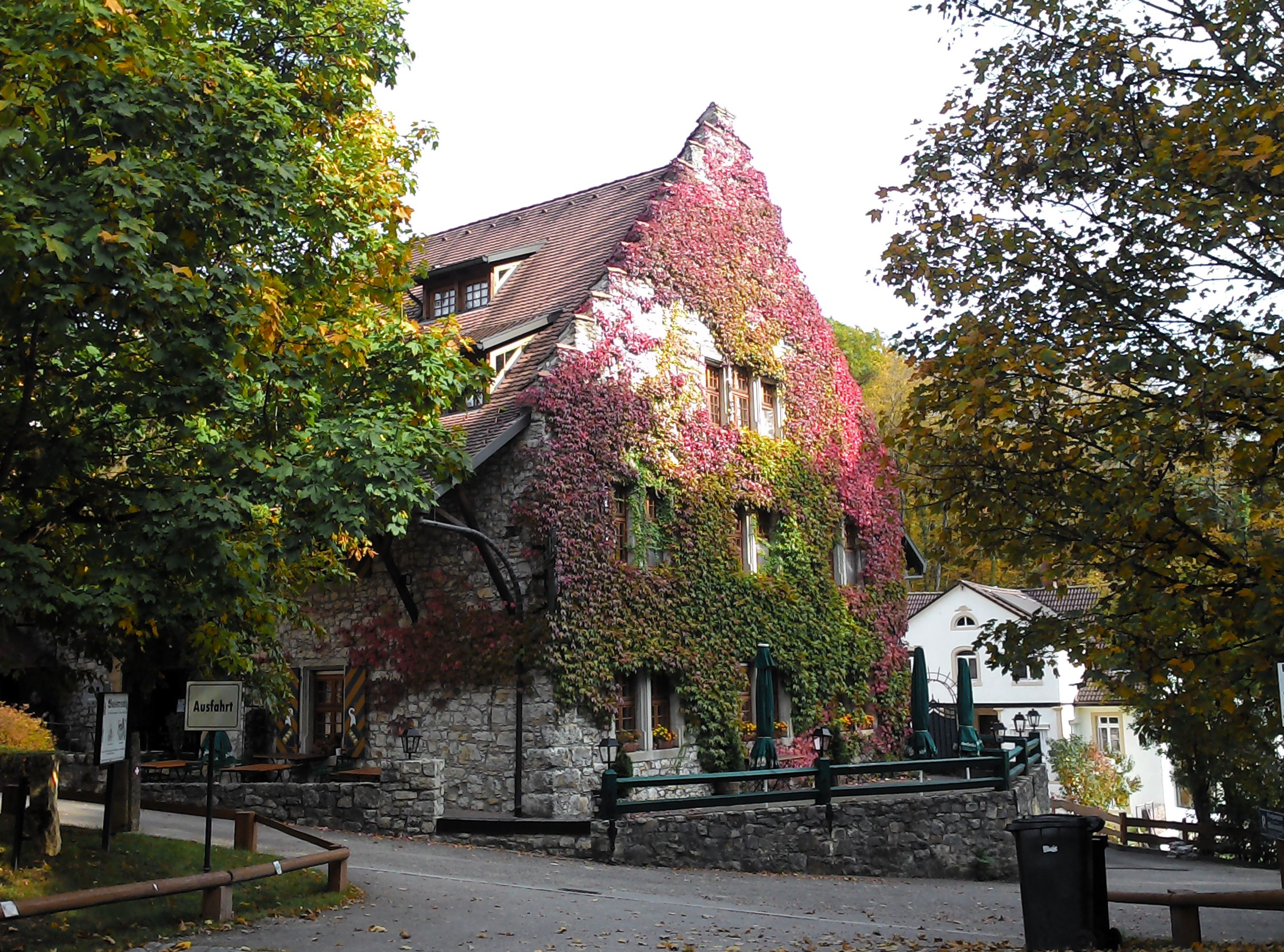 Schlosshof (Hotel Wasserstelz) bei der Guggenmühle und Burg Weisswasserstelz, Hohentengen am Hochrhein, Landkreis Waldshut.